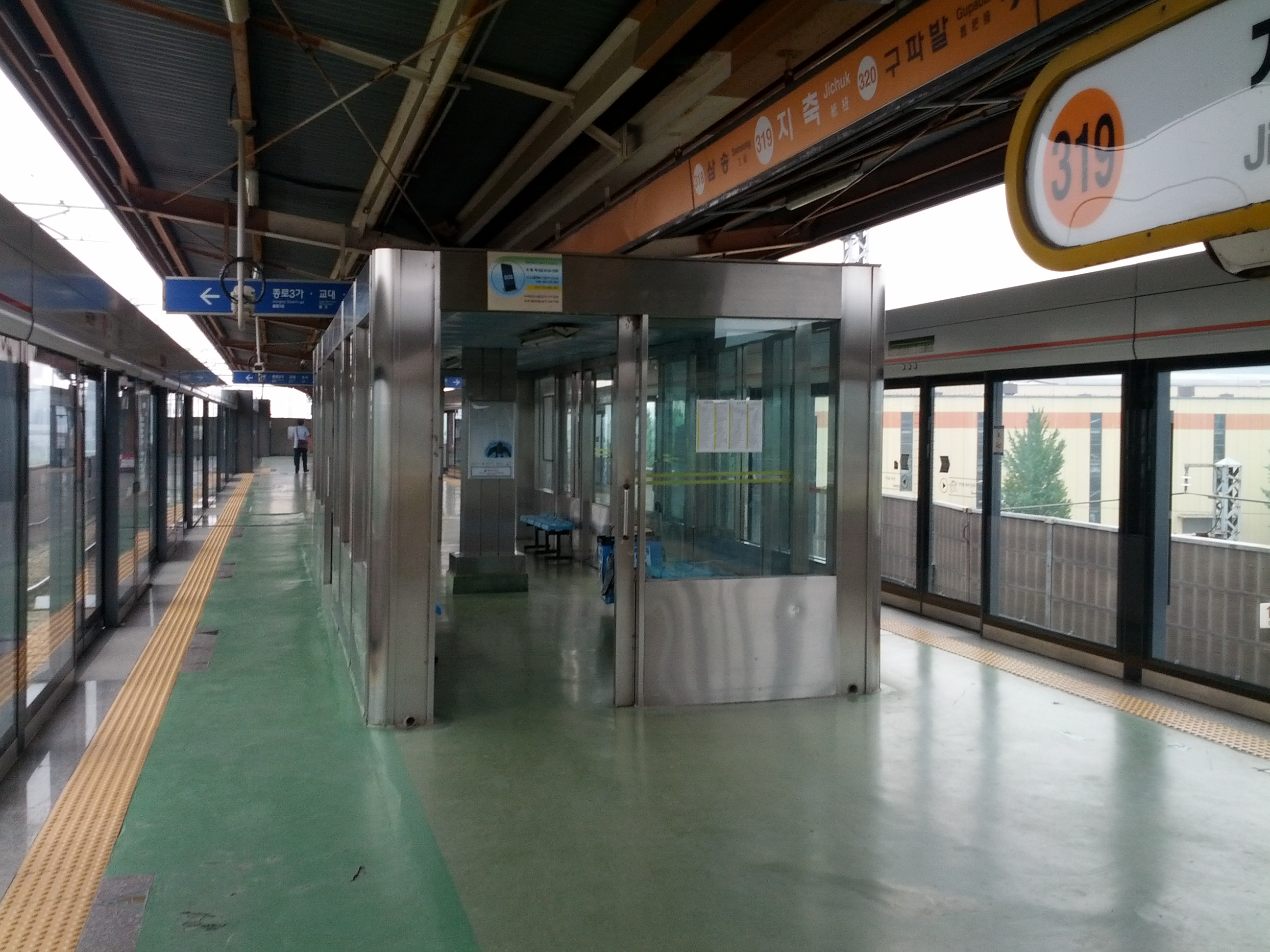 한국철도공사 지축역 승강장